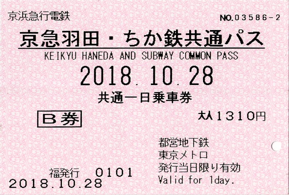 京浜急行電鉄 京急羽田・ちか鉄共通パス 共通一日乗車券 B券